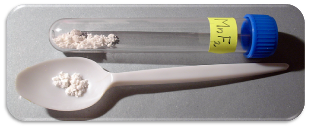 Fluorid mamganatý - MnF2